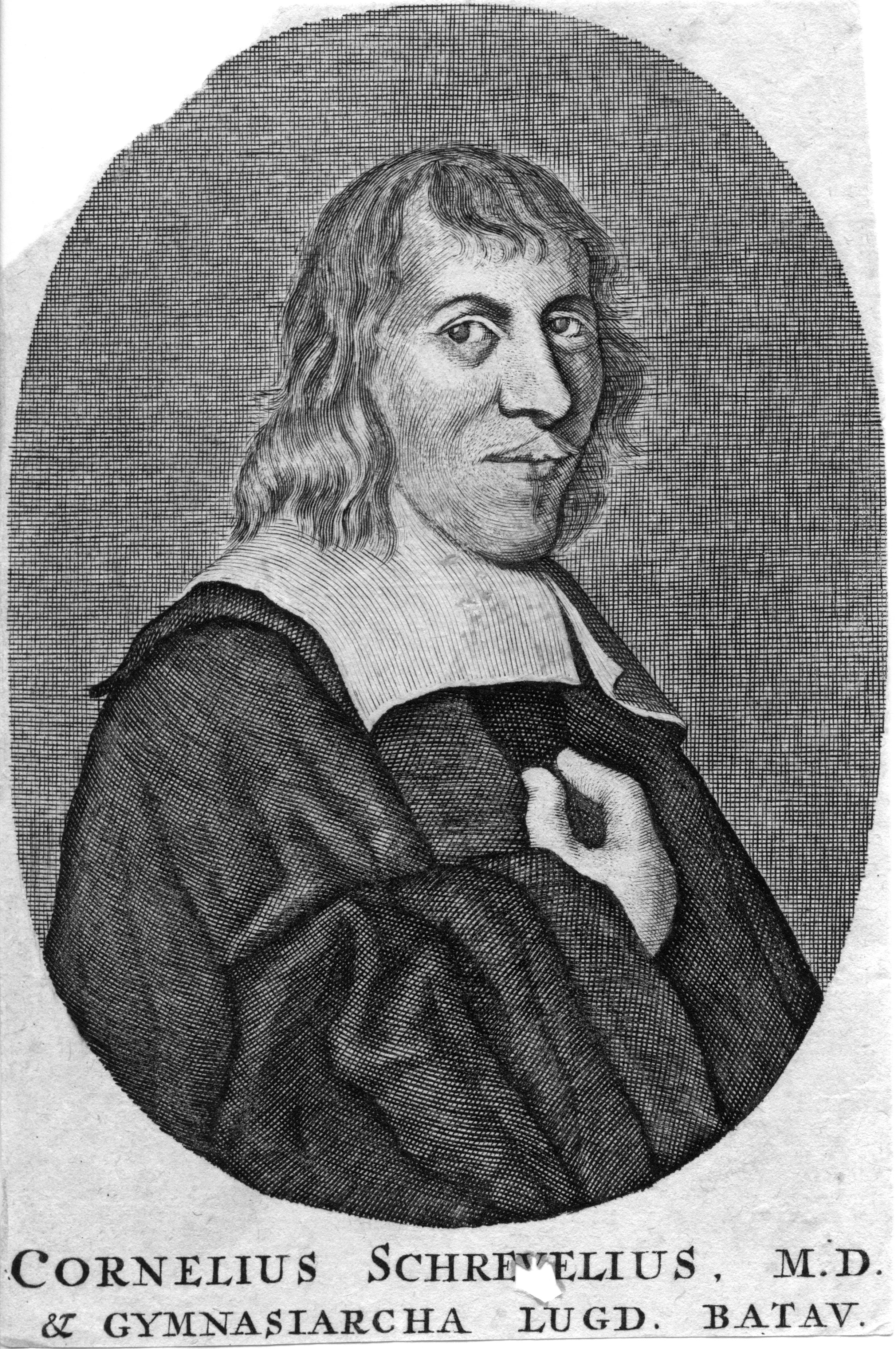 Cornelius Schrevelius. Reproduktion eines Stiches, dem ein bei „Abraham Jakob van der Aa, Encyclopedie Biografique Neerlandaise“ (1874) erwähntes Portrait zu Grunde gelegen hat. Inschrift: Cornelius Schrevelius, M.D. & Gymnarsiarcha Lugd[unum] Batav[orum] = Cornelis Schrevel, Dr. med., Schulleiter in Leiden in Batavien